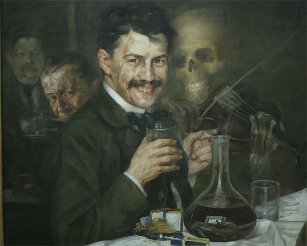 Fotografija slike Stevan Aleksić Autoportret u kafani (1901.), preneto sa sajta: Ovde